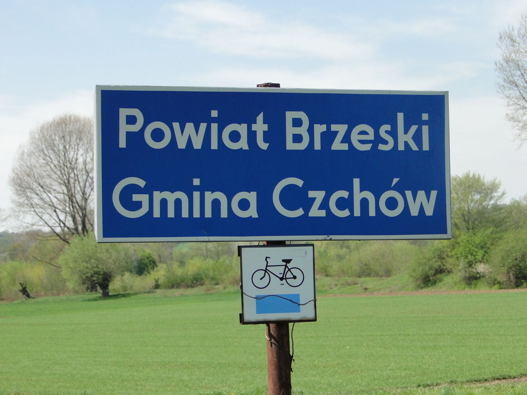 Tablica informująca o wjeździe do Gminy Czchów